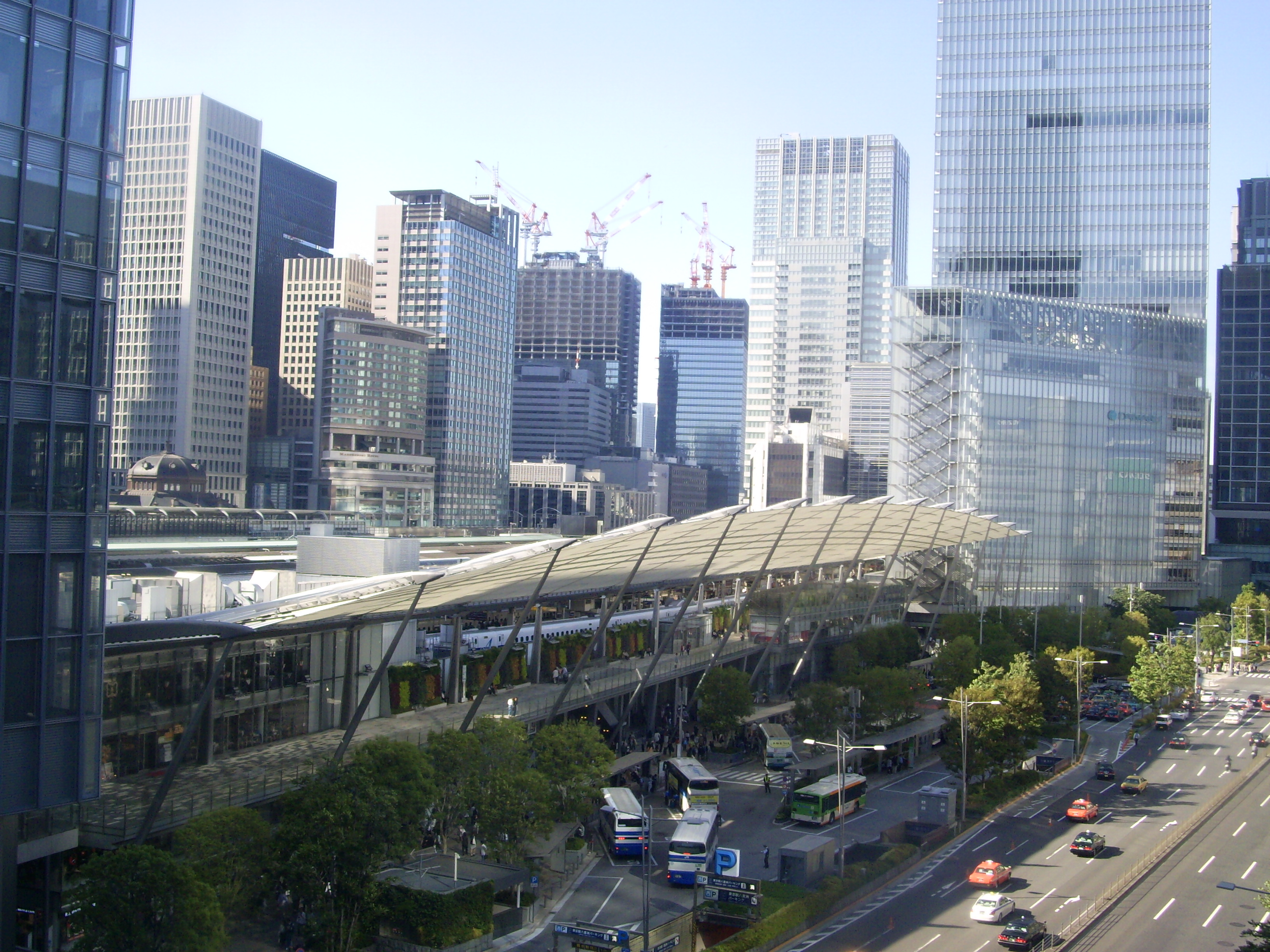 東京駅遠景：八重洲ブックセンターより ㊟カメラを起動すると日付機能が出荷時のものに初期化されるため、ファイル履歴の撮影日時とメタデータの原画像データの生成日時が異なります